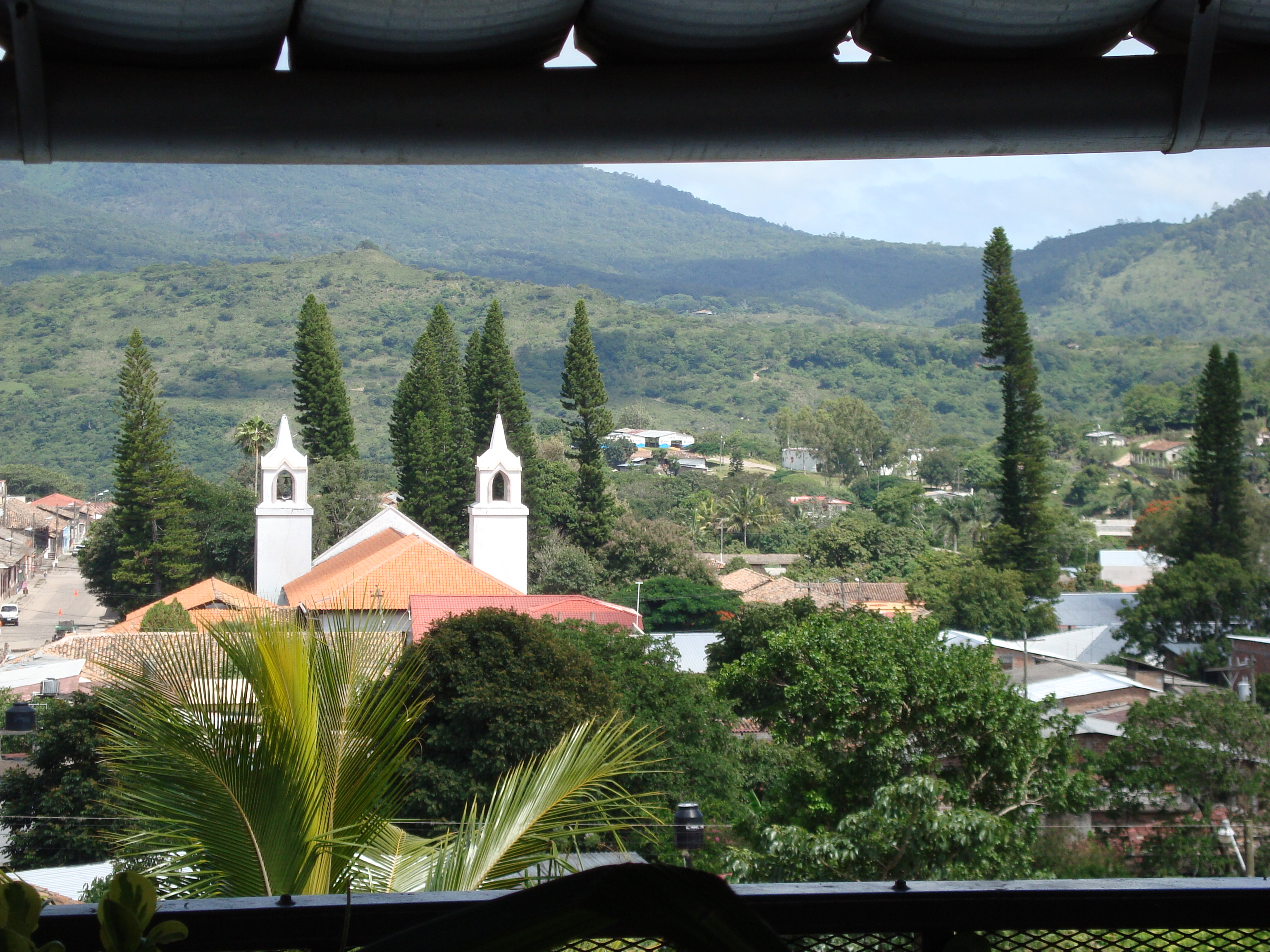 Vue sur l'église et sur le Parque Cabañas, au centre de la ville de San Marcos de Colón